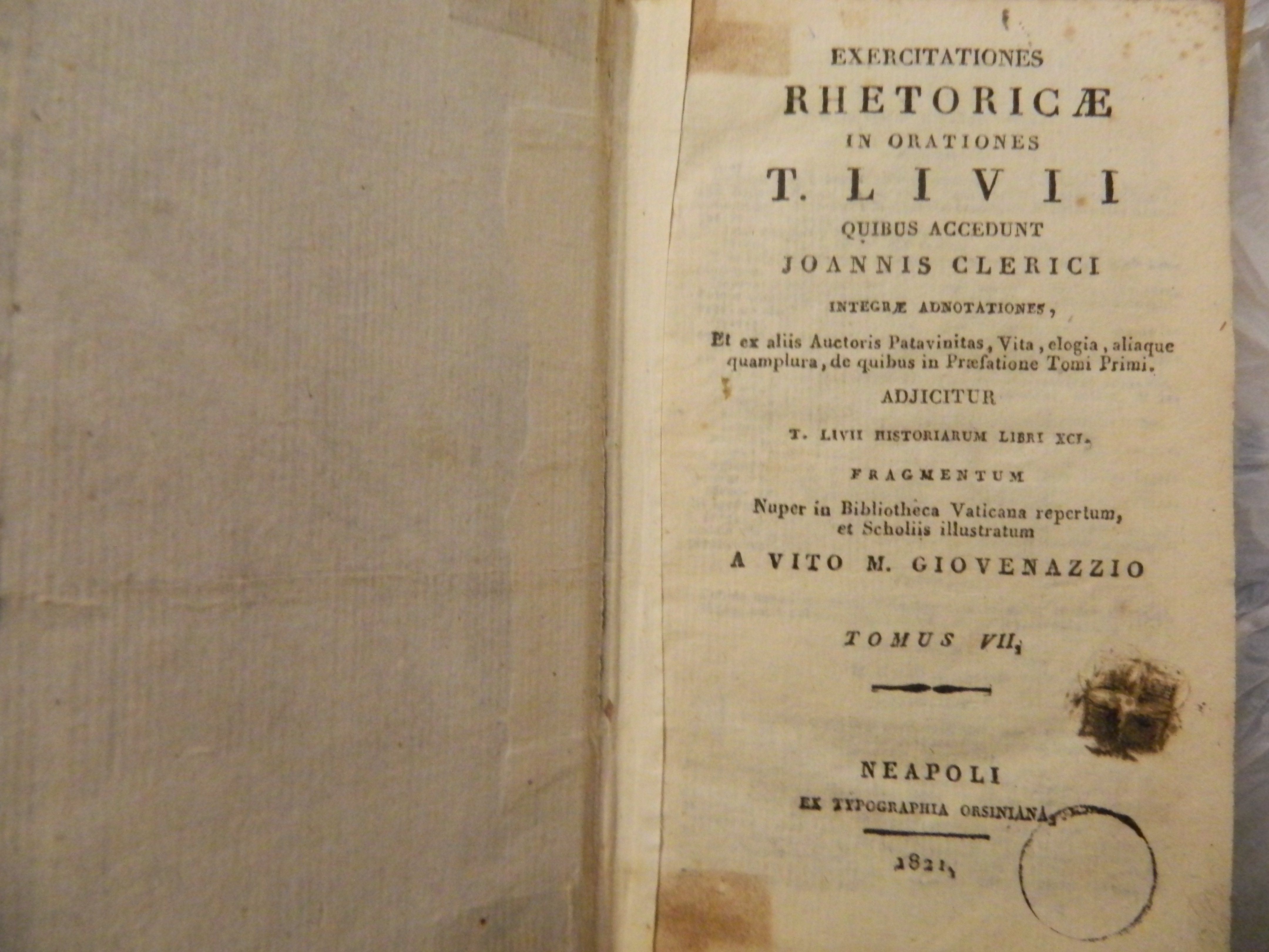 Exercitationes Rhetoricae In Orationes - Tomo VII frammento di T. Livii (stampa originale del 1821). L'ex gesuita Vito Maria Giovenazzi trovò questo frammento nella biblioteca Vaticana e lo attribuì a Tito Livio. Trovato il pezzo lo stampò subito con una prefazione di propria mano. Il Vaticano si è sin da subito opposto a tale scrittura ritenendola una impostatura solenne. Collezione privata.